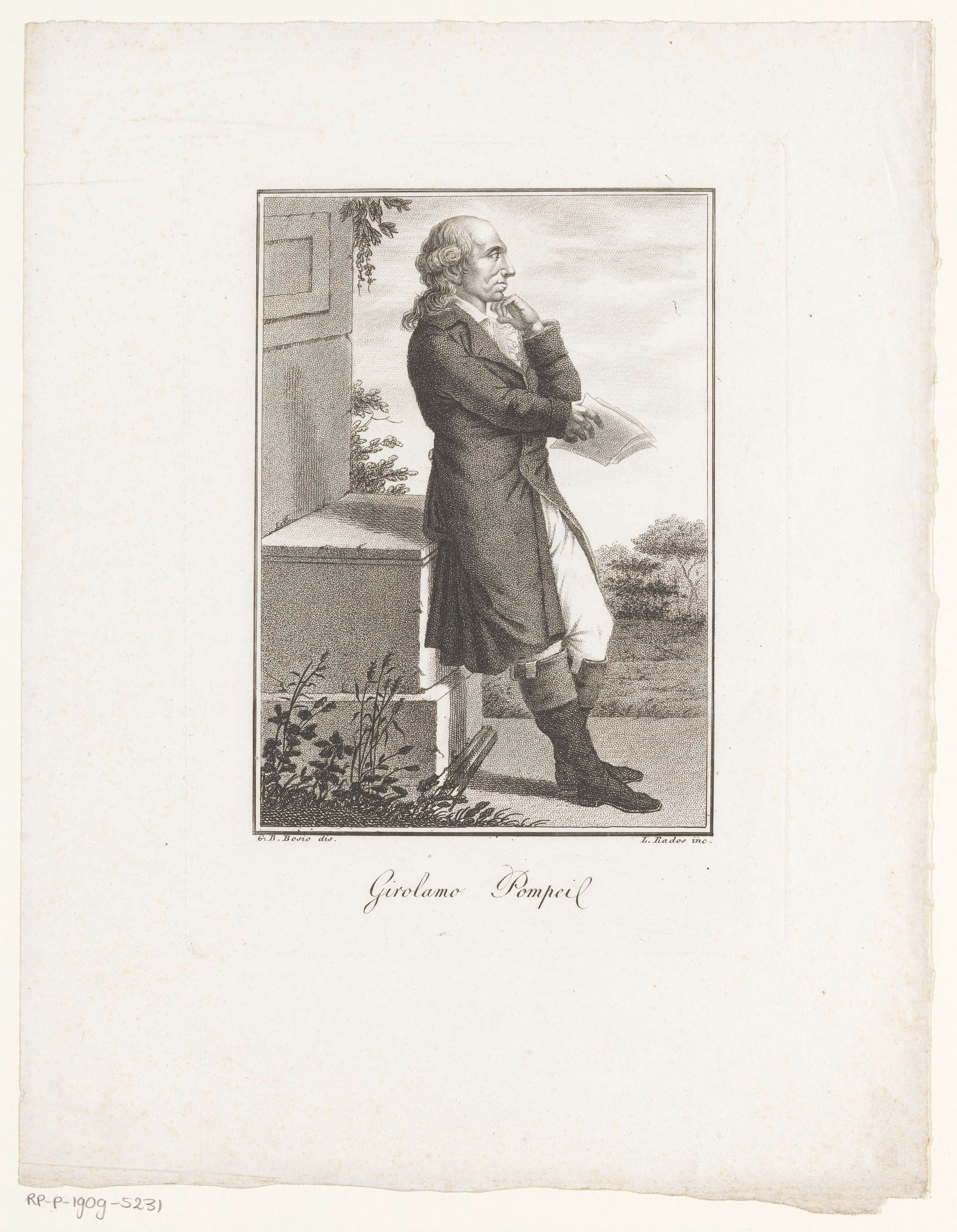 IdentificatieTitel(s): Portret van dichter Girolamo PompeiObjecttype: prent Objectnummer: RP-P-1909-5231Opschriften / Merken: verzamelaarsmerk, verso, gestempeld: Lugt 2228VervaardigingVervaardiger: prentmaker: Luigi Rados (vermeld op object)naar tekening van: Giovanni Battista Bosio (vermeld op object)Plaats vervaardiging: ItaliëDatering: 1783 - 1840Fysieke kenmerken: stippelwerk en etsMateriaal: papier Techniek: stippelwerk / etsenAfmetingen: plaatrand: h 213 mm × b 155 mmOnderwerpWat: historical personsportrait of a writerwriter, poet, authorWie: Girolamo PompeiVerwerving en rechtenVerwerving: aankoop 1905Copyright: Publiek domein